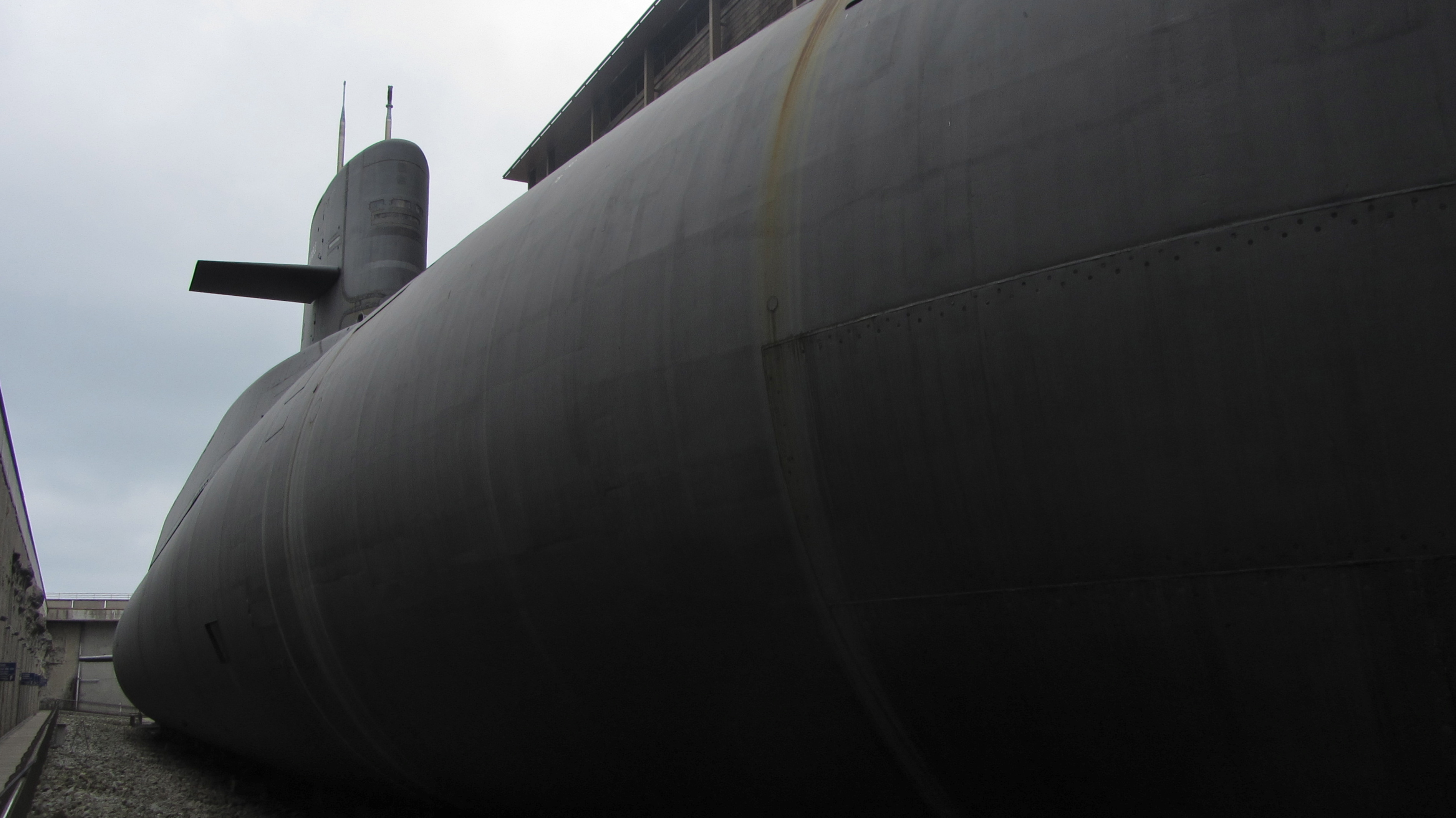 Le Redoutable in der Cite de la Mer in Cherbourg